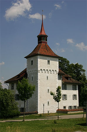 Landvogteischloss in Willisau